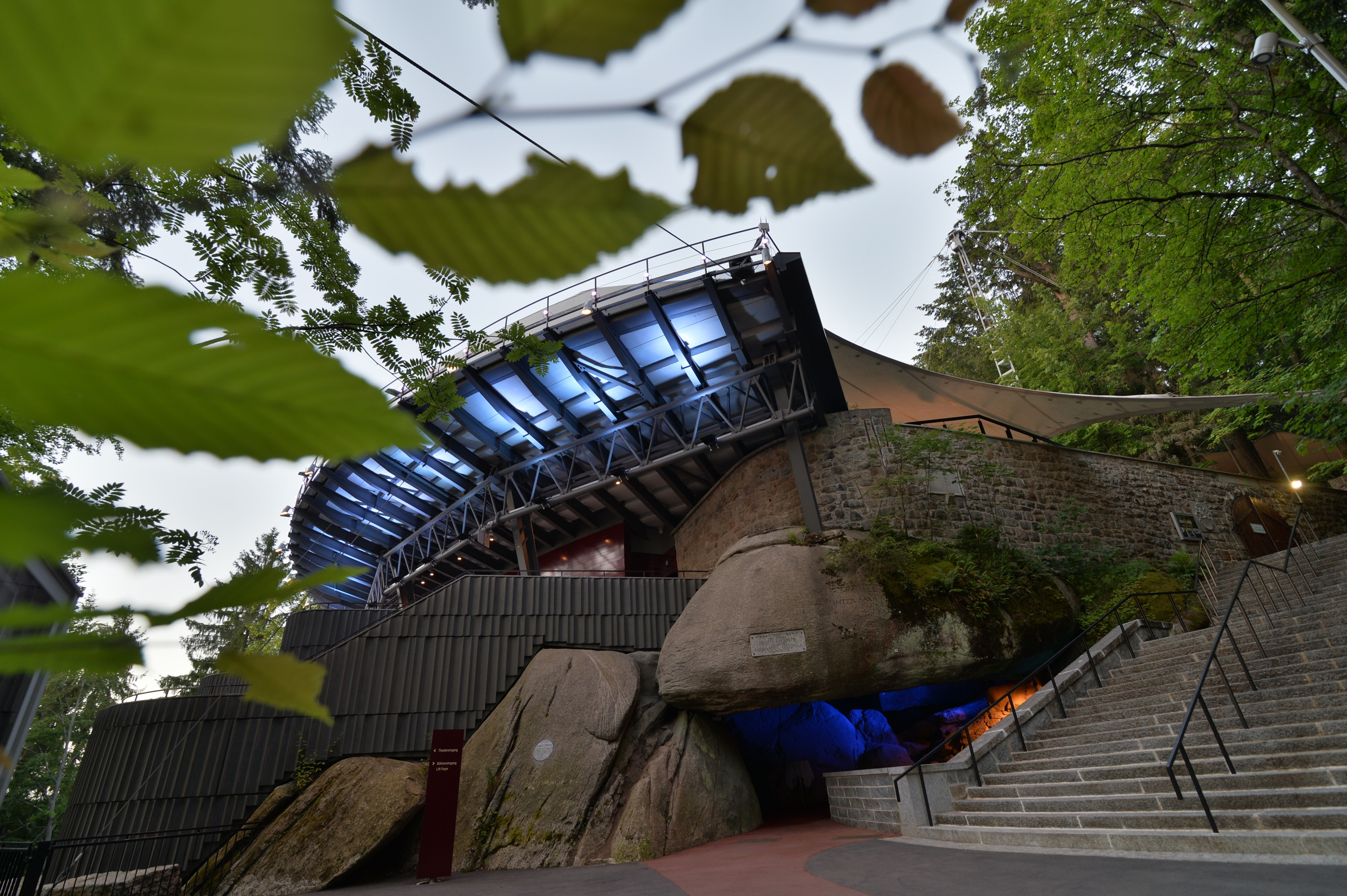 Eingang